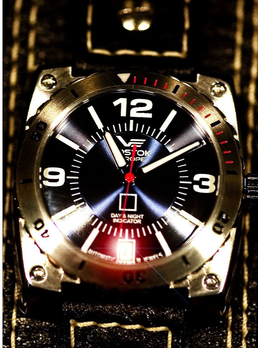 Vostok Europe watch